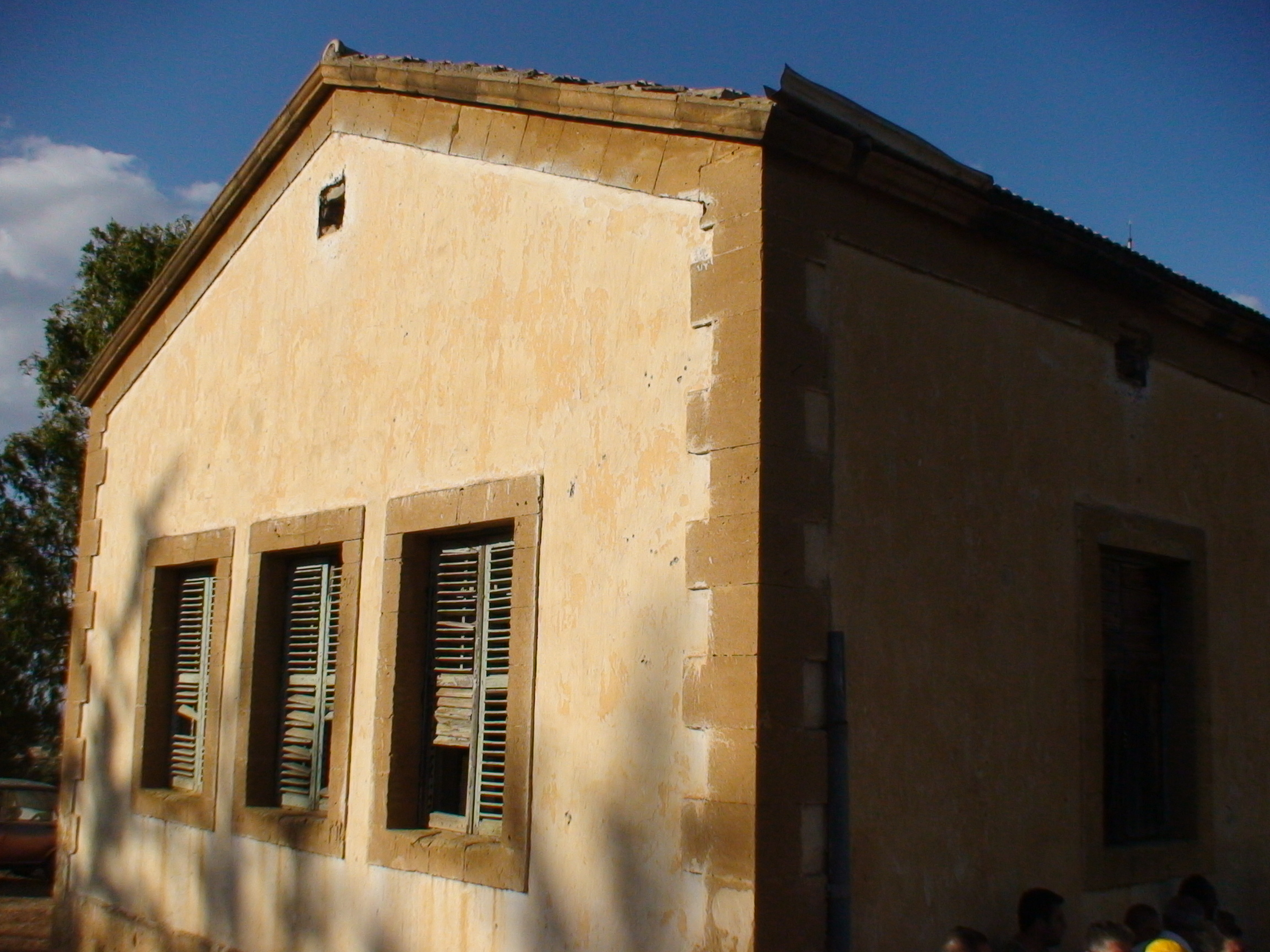 Kıbrıs'taki Taşpınar köyünün artık kullanılmamakta olan ilkokul binası.